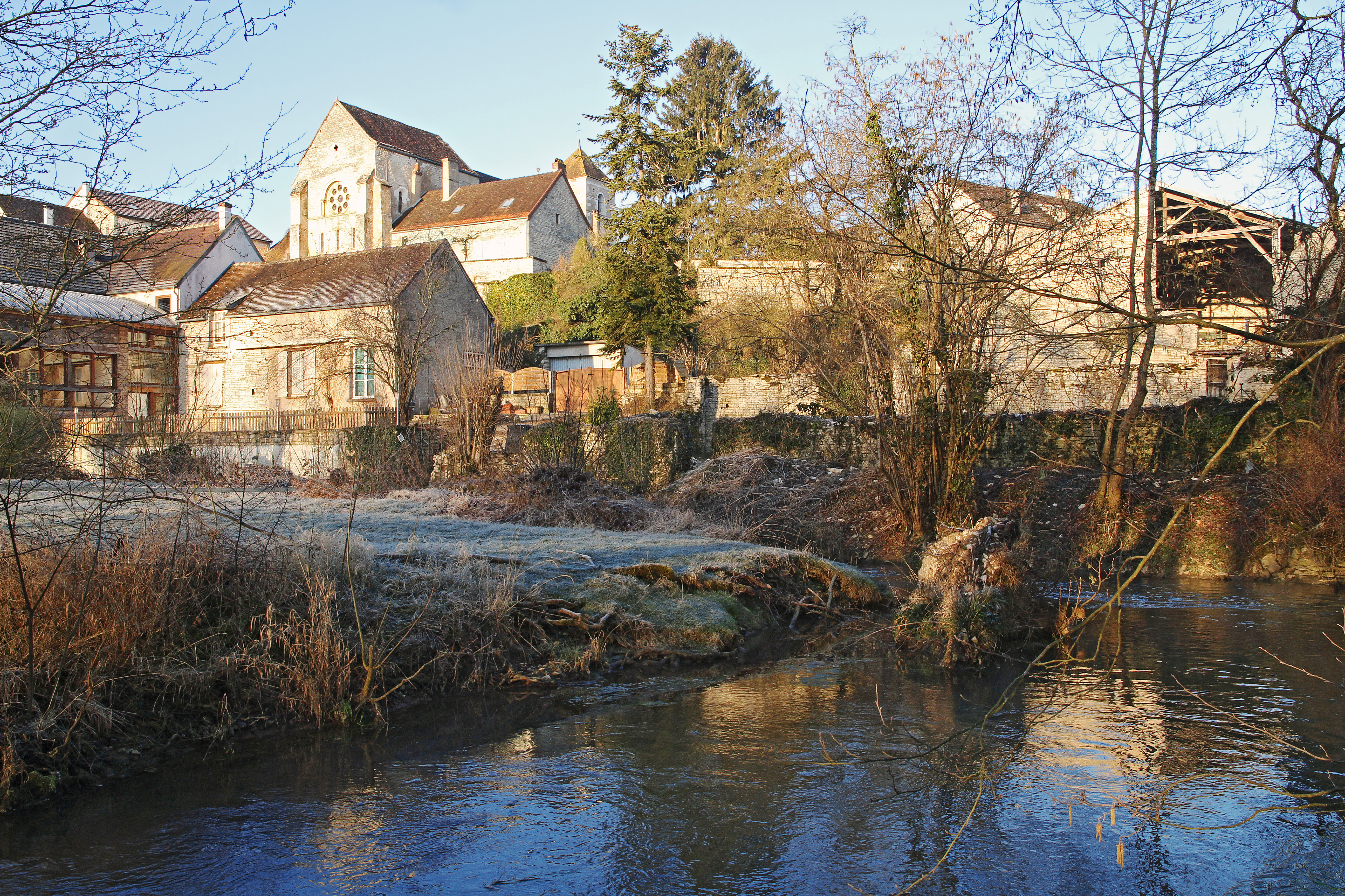 Village de Sainte-Vertu au bord du Serein